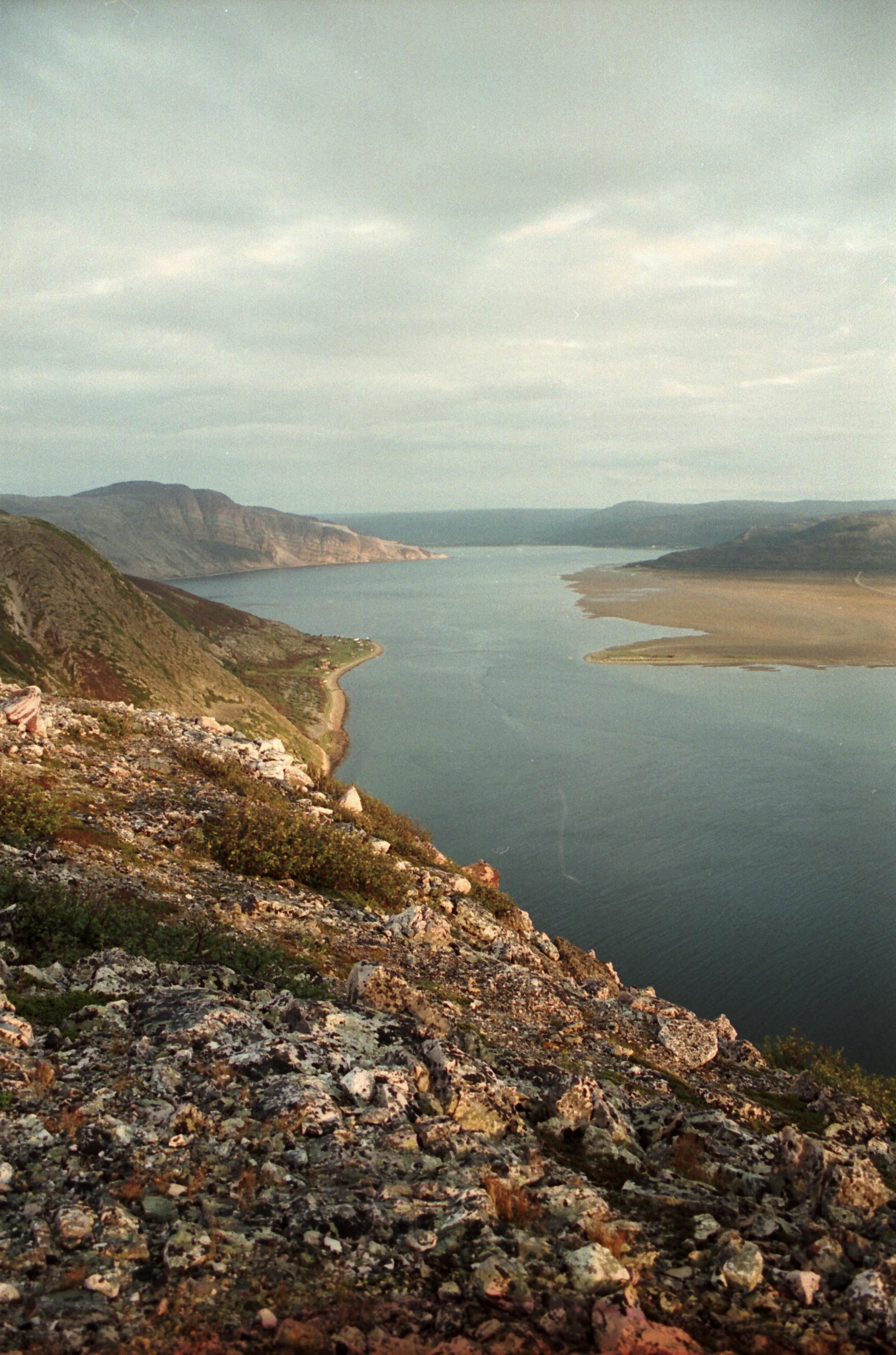 Leirpollen